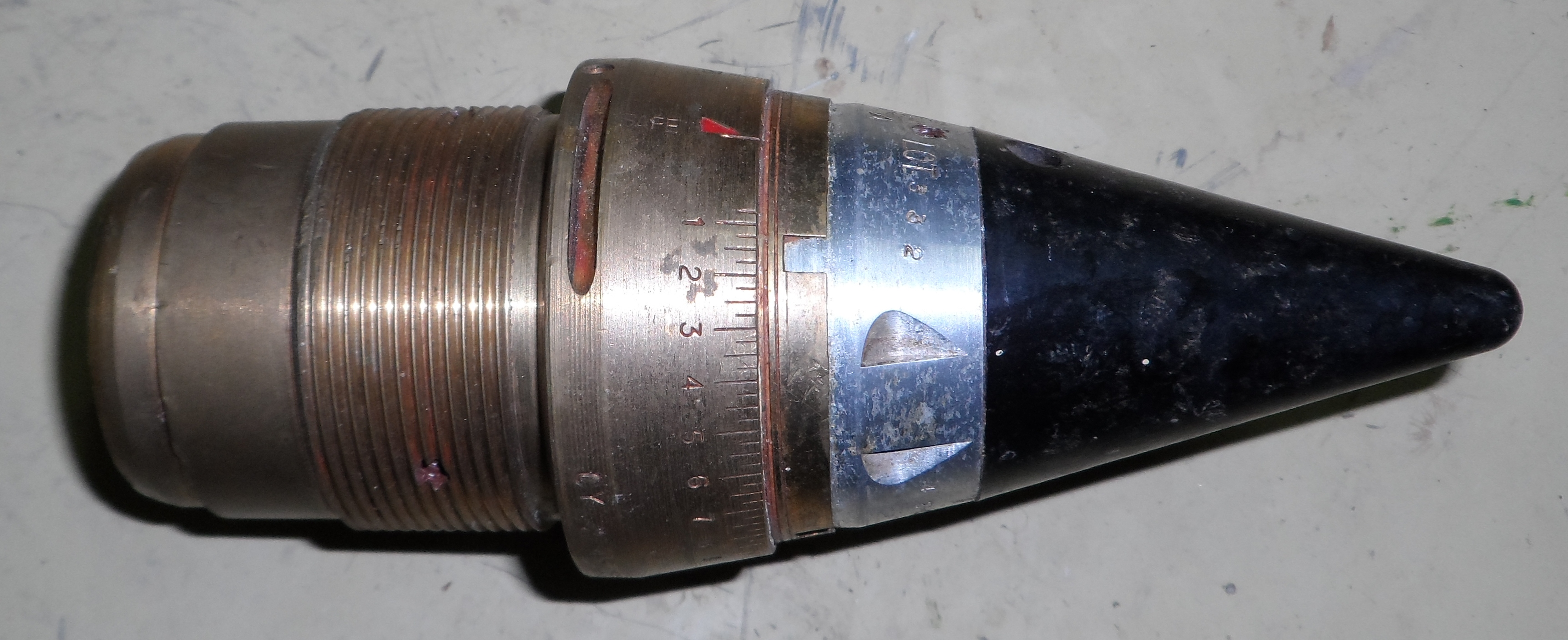 Zeitzünder für 120 mm Nebelgranate